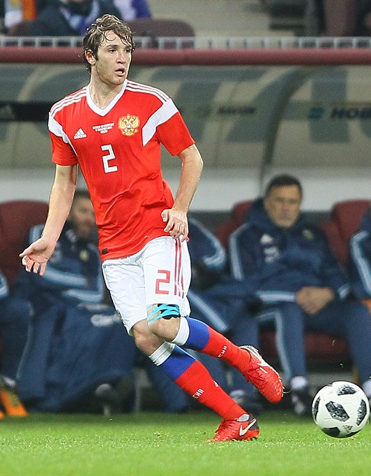 Mário Figueira Fernandes